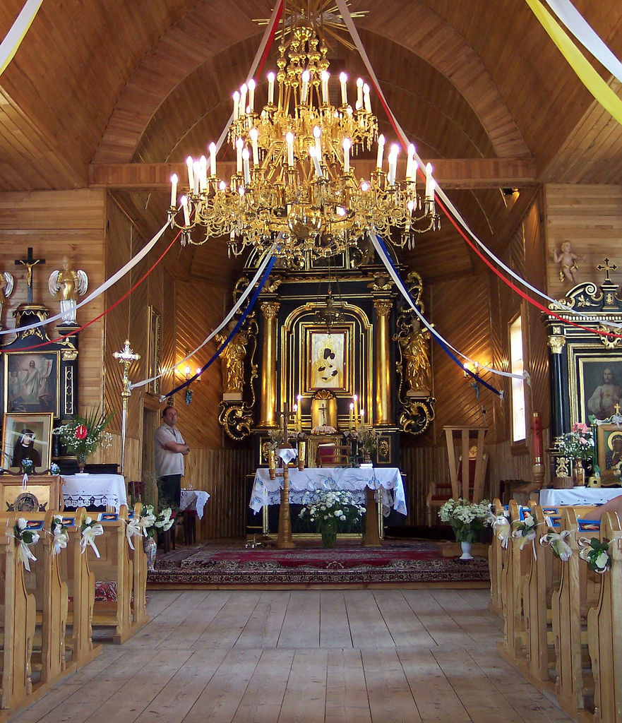 Oszczów - wnętrze kościoła